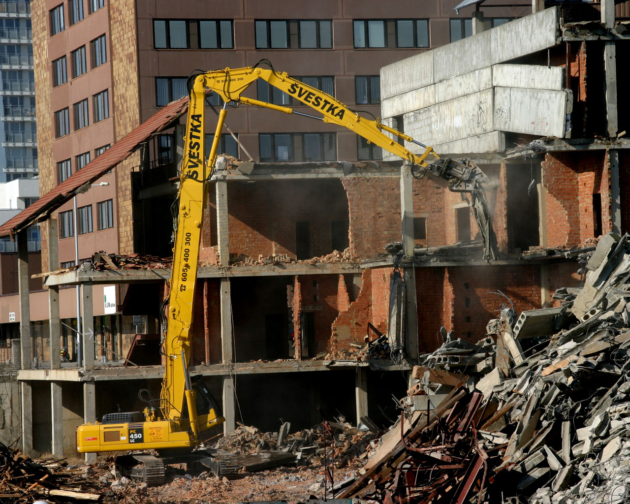 demolice budovy v průmyslovém areálu (location ?)